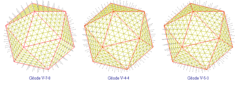 Géodes à base d'icosaèdre : étape 4 de la construction